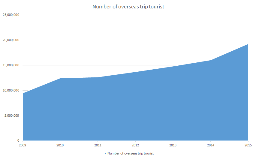 2009년 부터 2015년 까지의 년도별 한국인 전체 해외 여행 횟수를 나타낸 그래프.